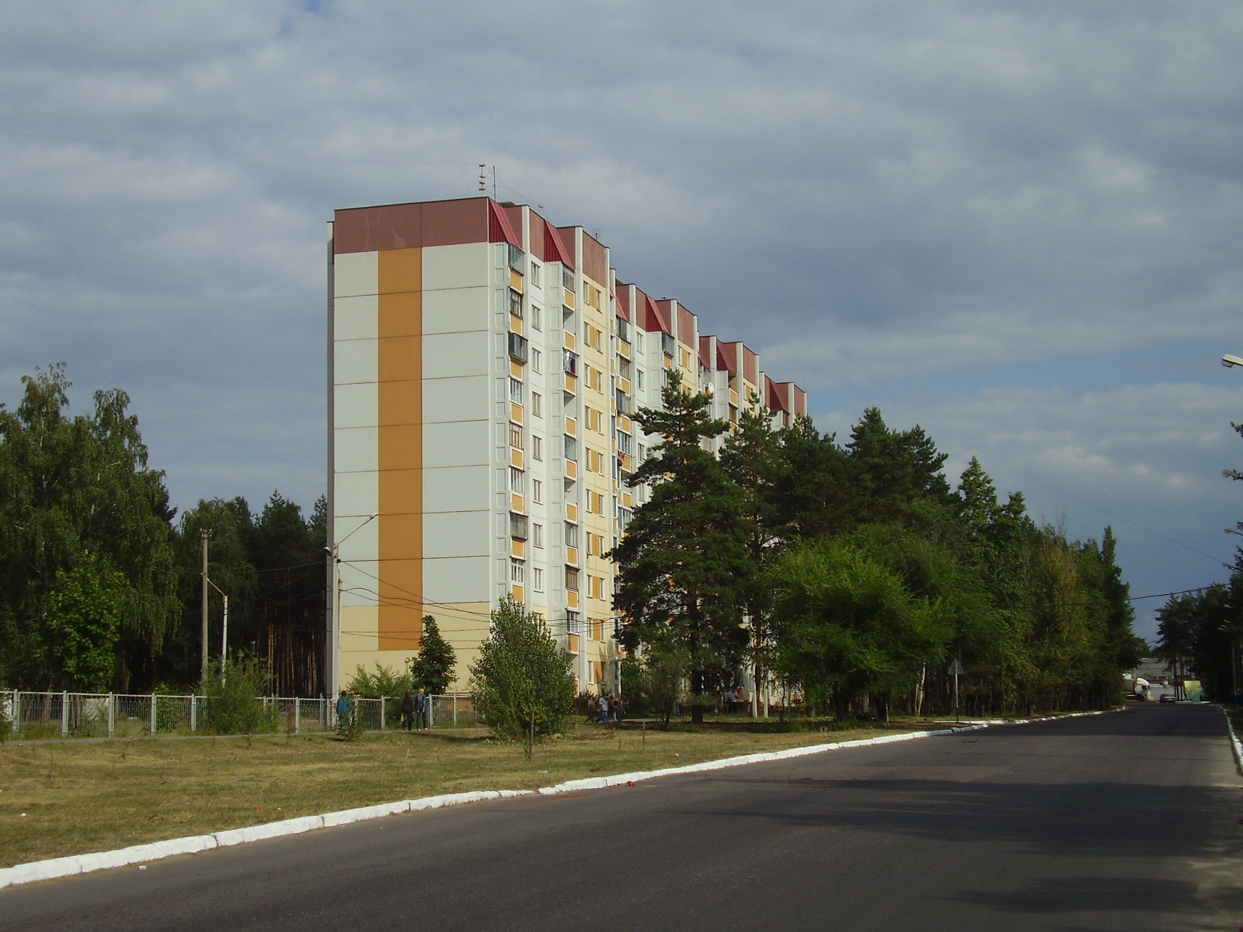 Новый 10-этажный дом в Придонском